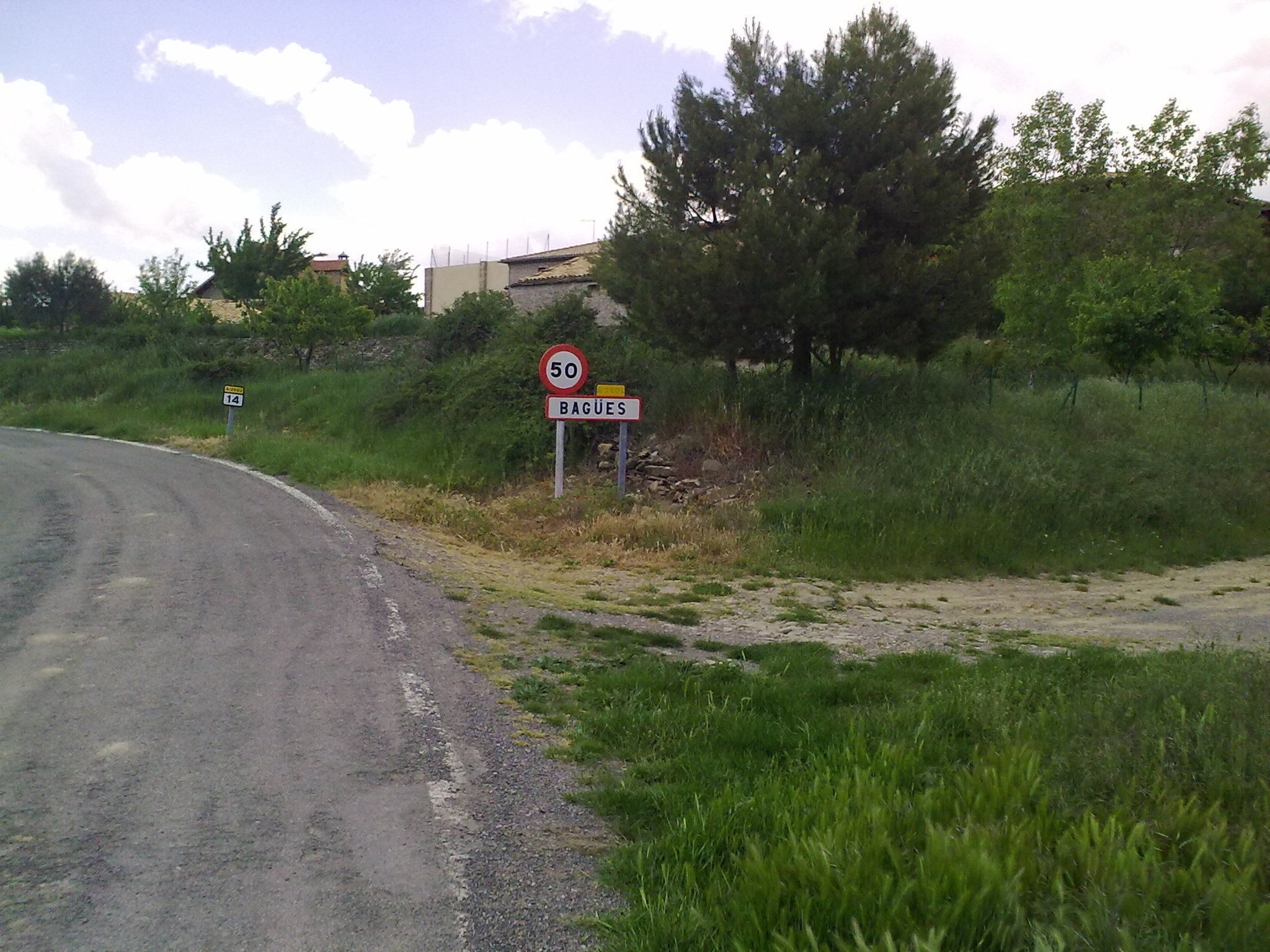 Bagüés, le 23 mai 2010.